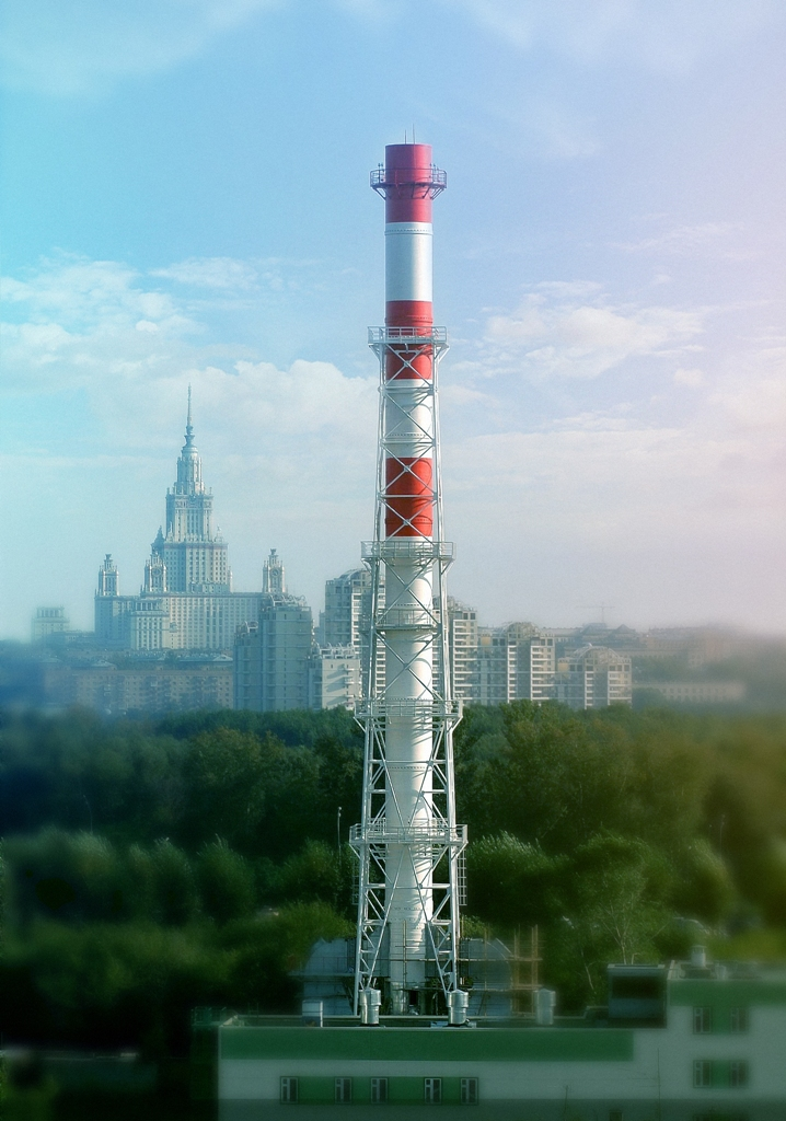 Газоотводящие стволы дымовых труб из стеклопластика для отвода дыма, загрязненного воздуха, агрессивных газов на промышленных предприятиях, ТЭЦ и котельных